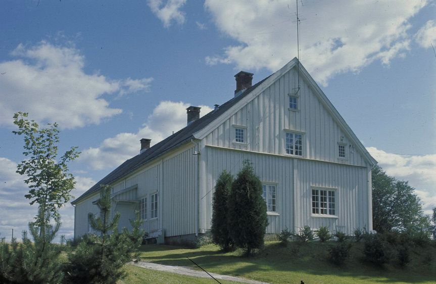 Rakkestad prestegård. Foto: Ina Backer. Fra Riksantikvarens Kulturminnesøk.